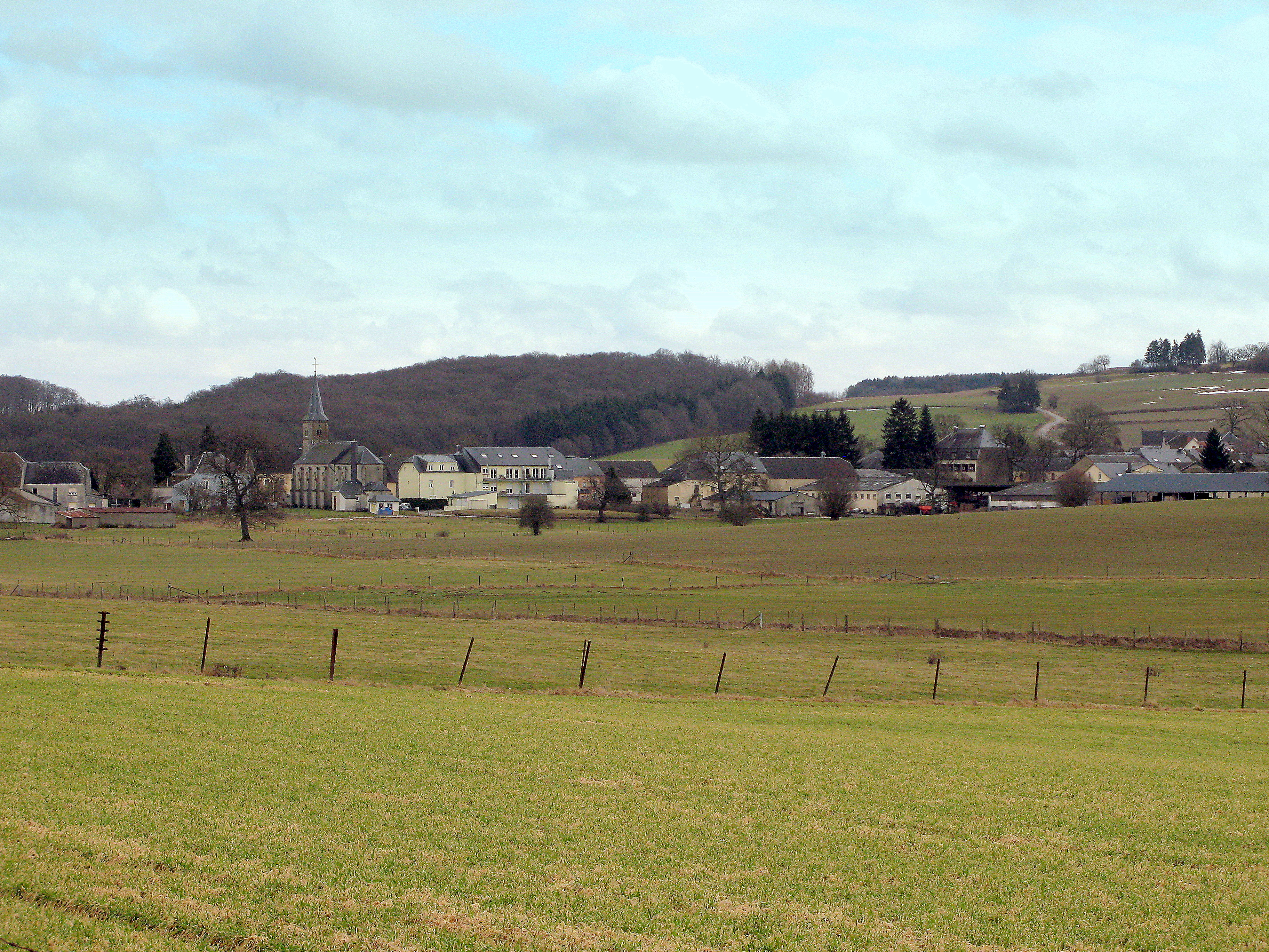 Koler vu Grass aus gesinn